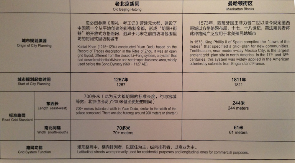 Informationstavla i Shijia Hutong Museum i Peking.